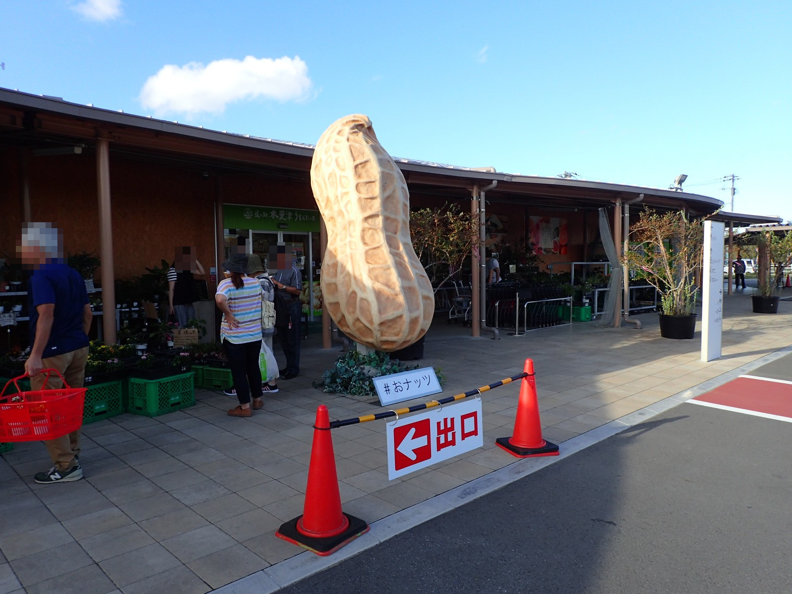 道の駅 木更津うまくたの里の外観